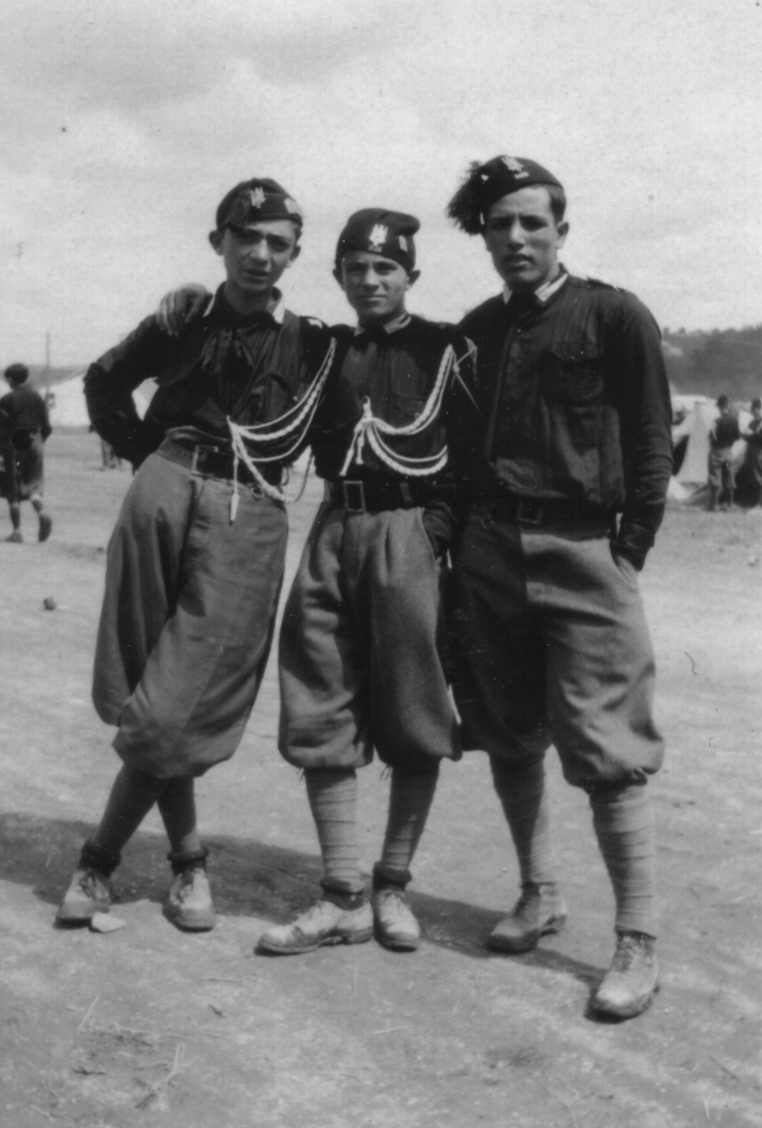 Silvio Riggio (al centro) e due altri ragazzi, in divisa dell' Avanguardia giovanile fascista, nel 1925, durante il periodo fascista.